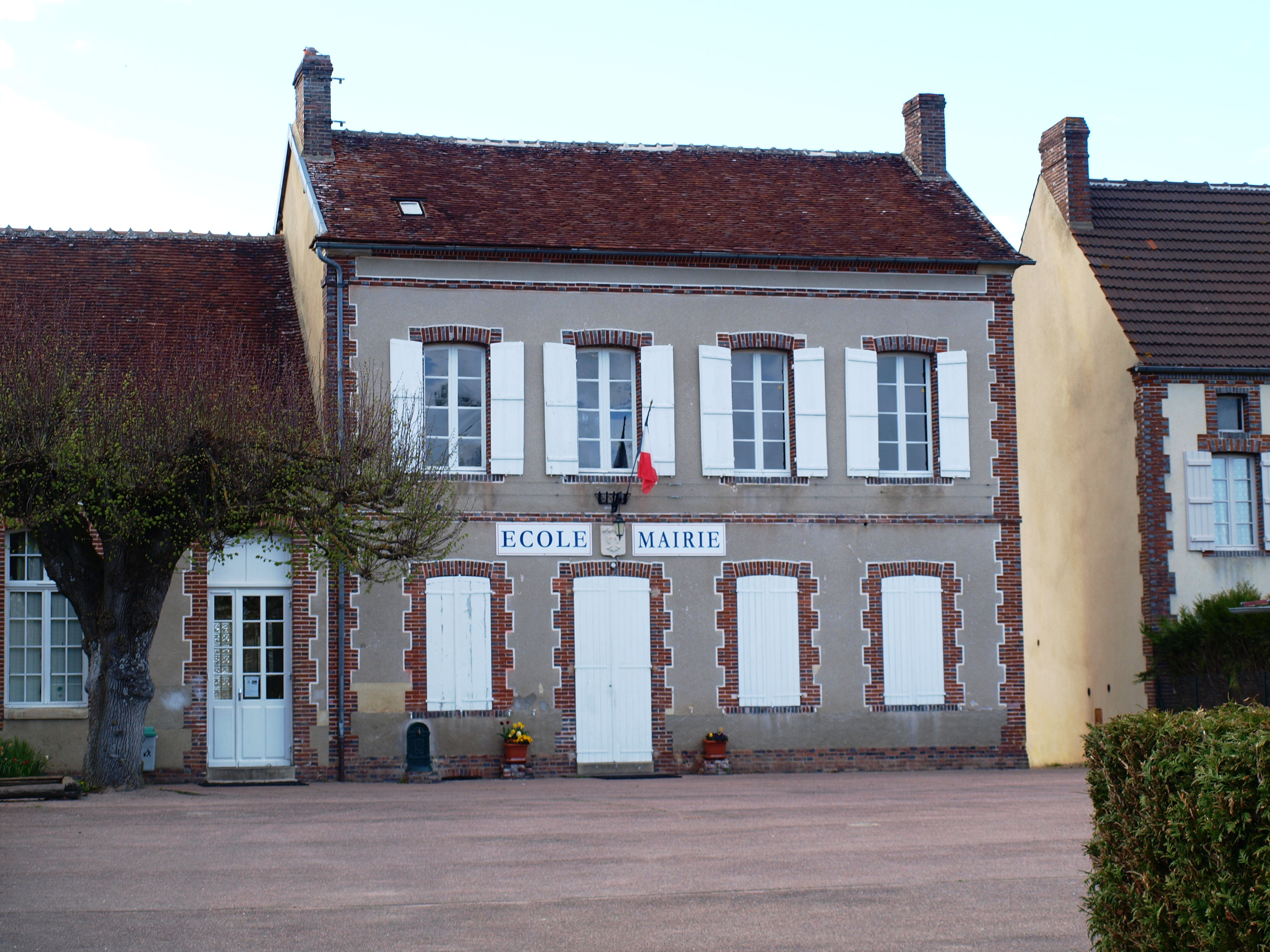 Saint-Maurice-Thizouaille (Yonne, France) ; la mairie école.